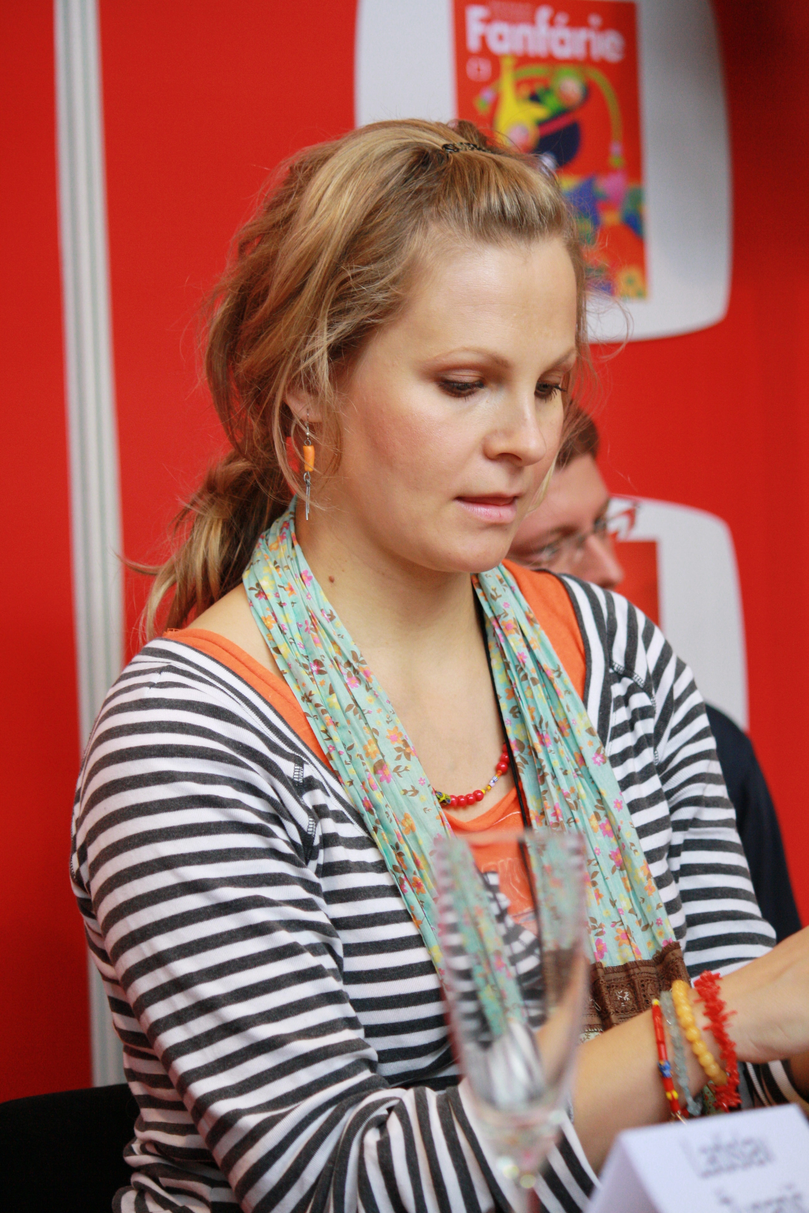 Knižní veletrh Svět knihy 2010 - křest knihy O češtině 3 na stánku České televize Personality rights warningAlthough this work is freely licensed or in the public domain, the person(s) shown may have rights that legally restrict certain re-uses unless those depicted consent to such uses. In these cases, a model release or other evidence of consent could protect you from infringement claims.